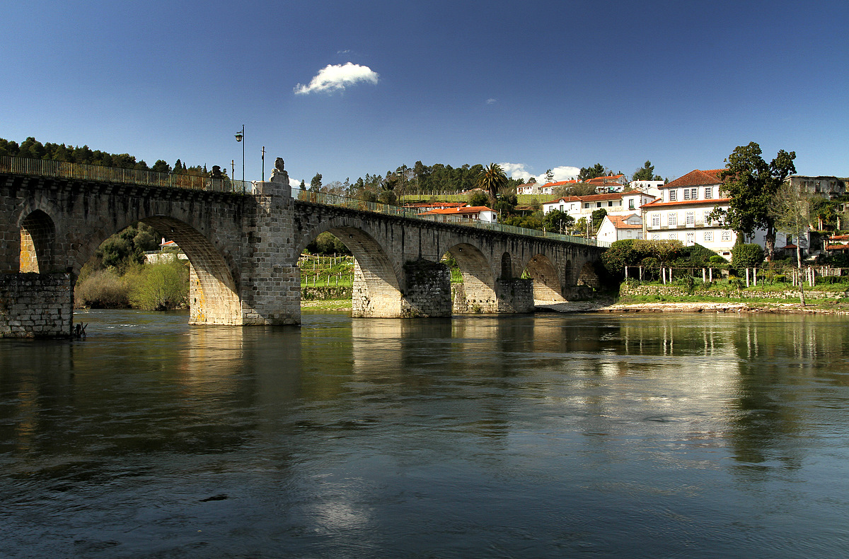 Ponte da Barca - Ponte sobre o rio Lima